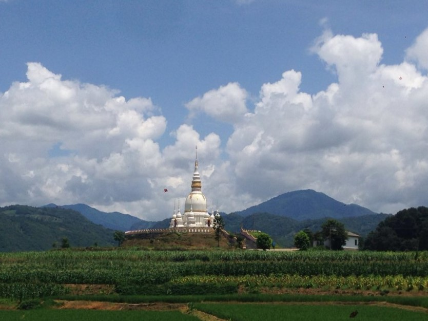 中文（中国大陆）: 云南省沧源佤族自治县班老白塔